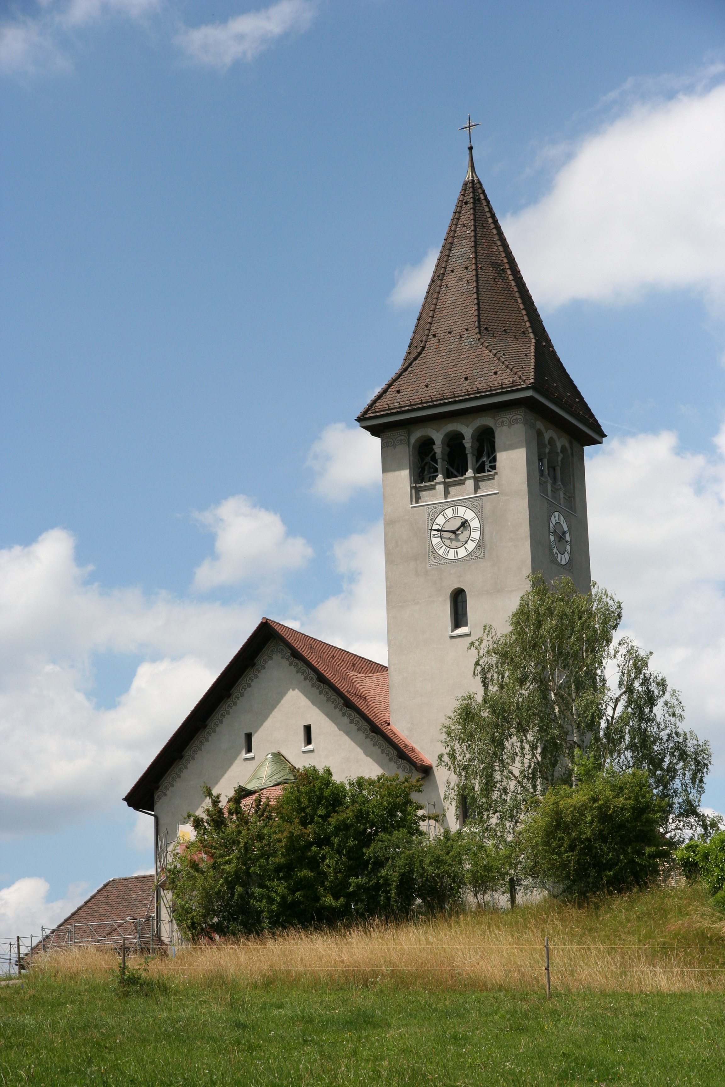 Römisch-katholische Pfarrkirche St. Franziskus Wetzikon